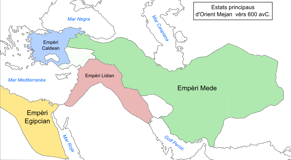 Estats principaus d'Orient Mejan après la casuda de l'Empèri Assirian.